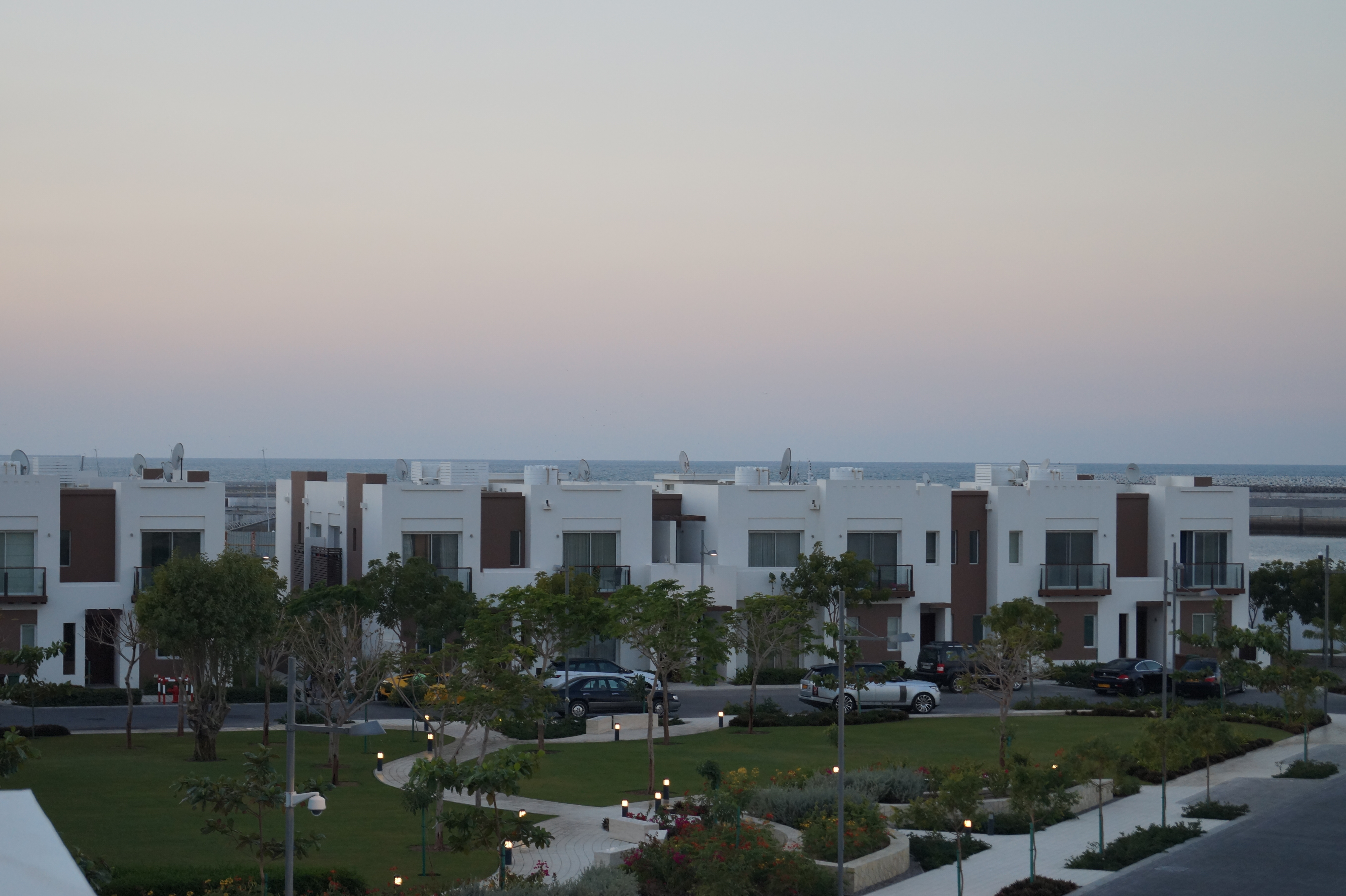 Acacia Garden